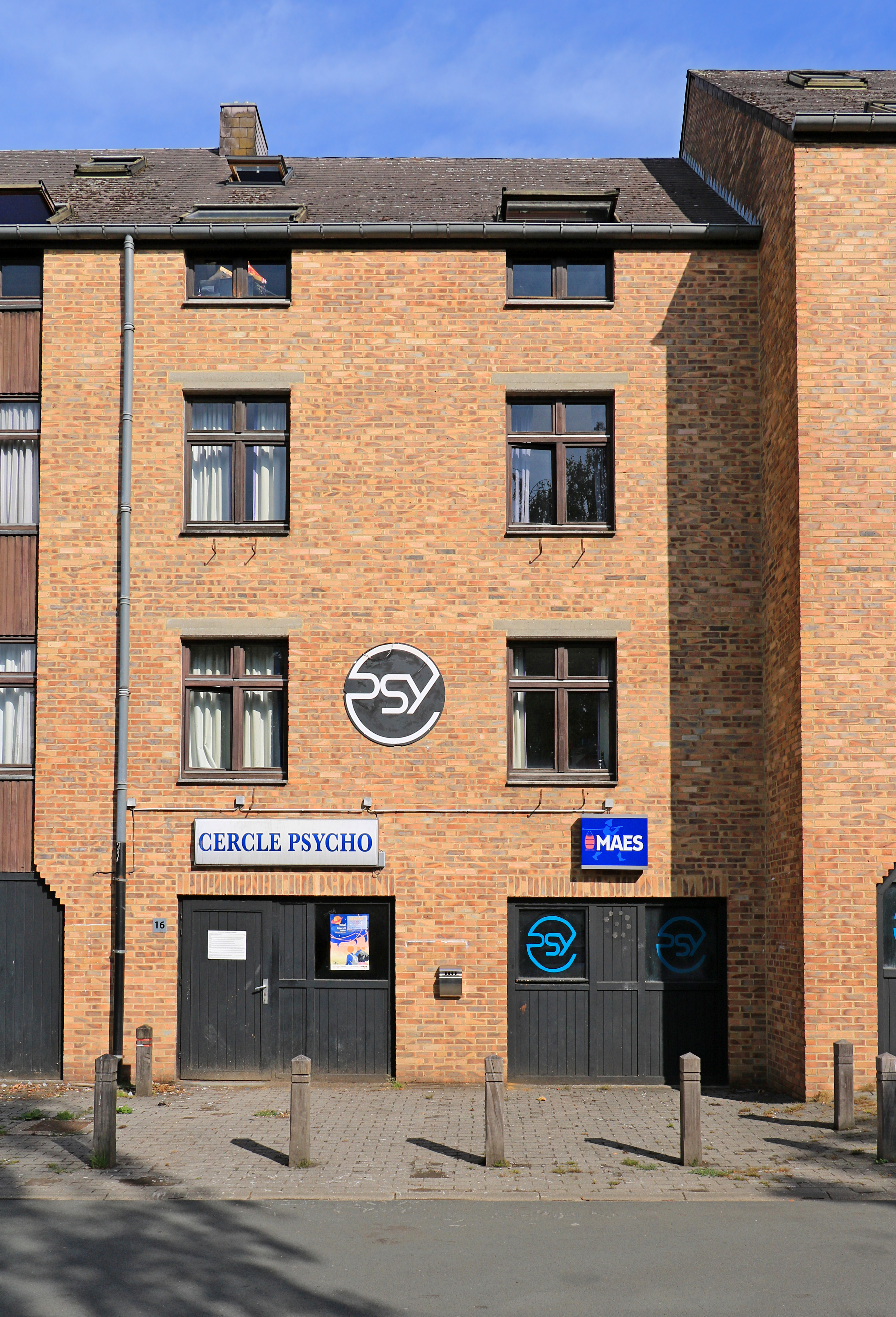 Belgique - Louvain-la-Neuve - Cercle Psycho (voie Cardijn 16)